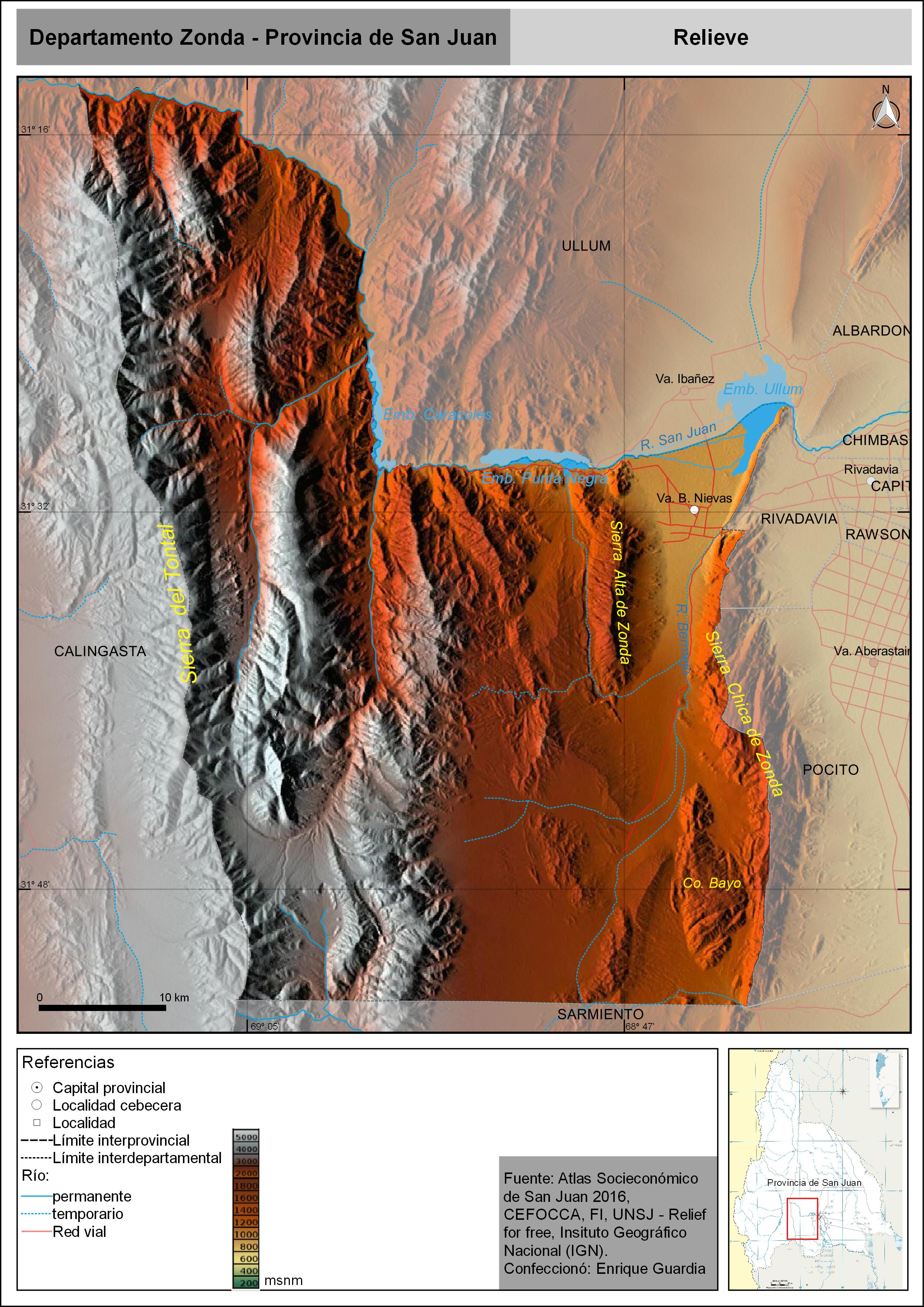 Mapa del relieve del departamento Zonda, provincia de San Juan, Argentina